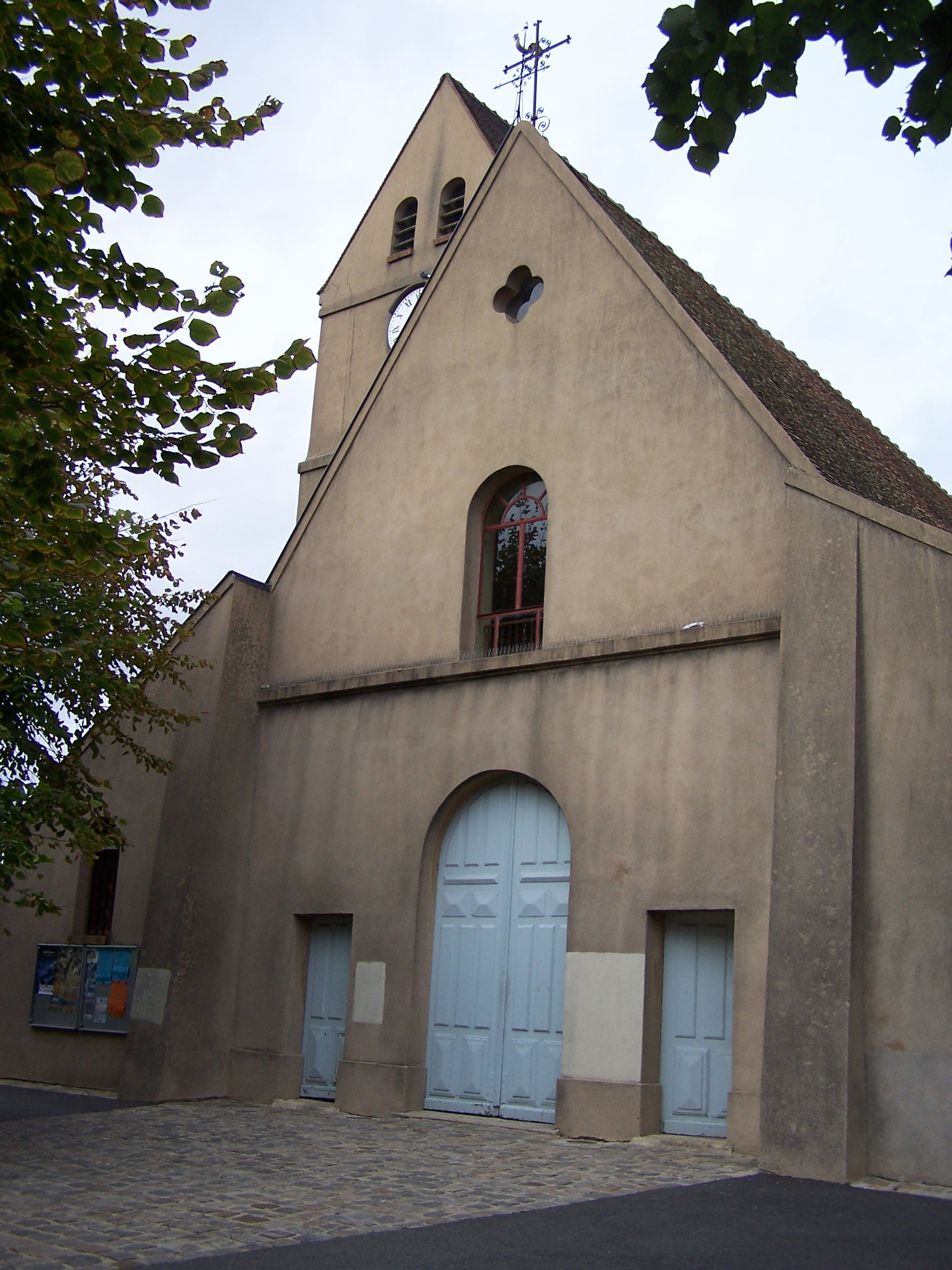 Église Saint Lubin de Noisy-le-Roi (Yvelines, France)